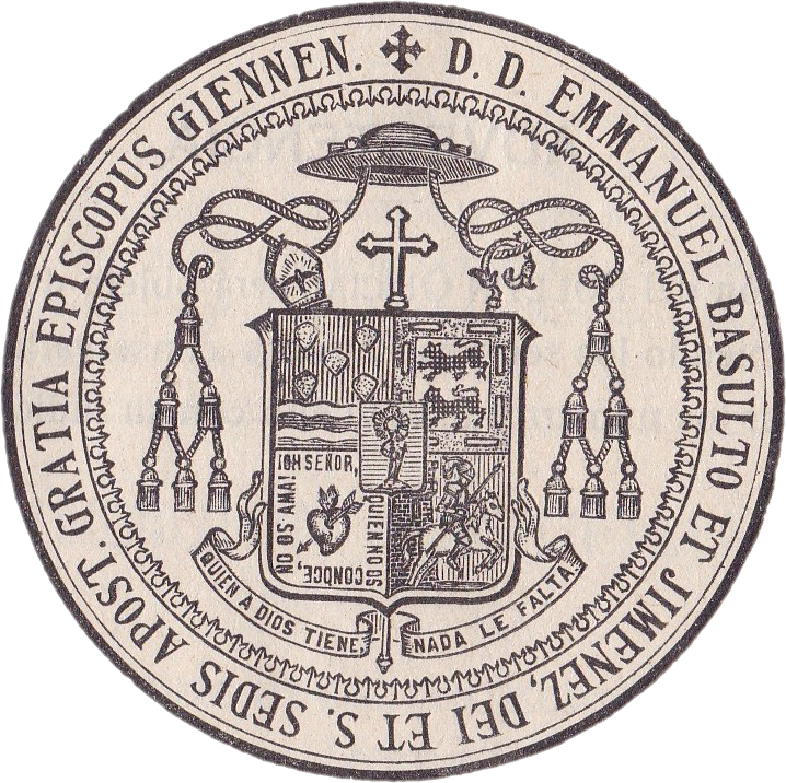 Heráldica de D. Manuel Basulto Jiménez, Obispo de Jaén (1919-1936)